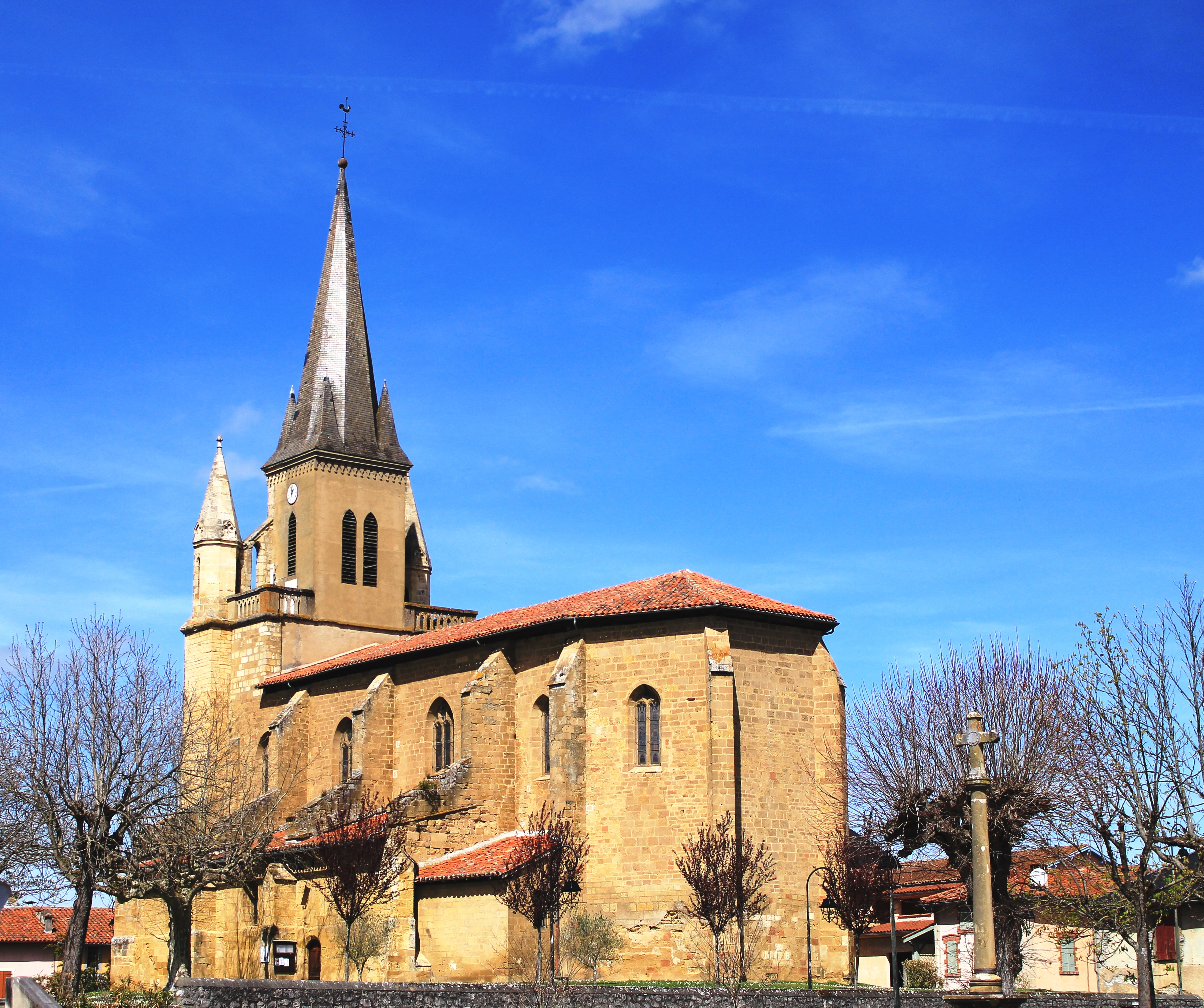 Église Saint-Julien de Galan (Hautes-Pyrénées)